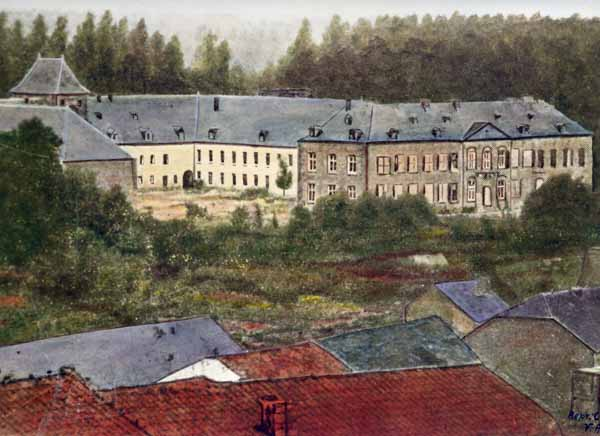 D'Bervart-Schlass zu Esch-Uelzecht, 1868. Erlabnes: De User:Zinneke krut de 16.02.2010 vum Patrick Jung, Auteur a Bedreiwer vum Site , d'Erlabnes, dëst Bild, mat Mentioun vun der Source, op d'Wikipedia eropzeluden.